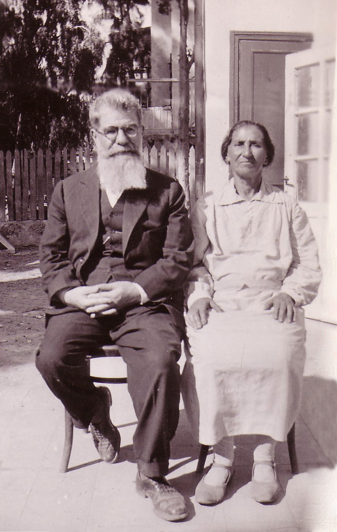 ברכה וישראל יהודה אדלר